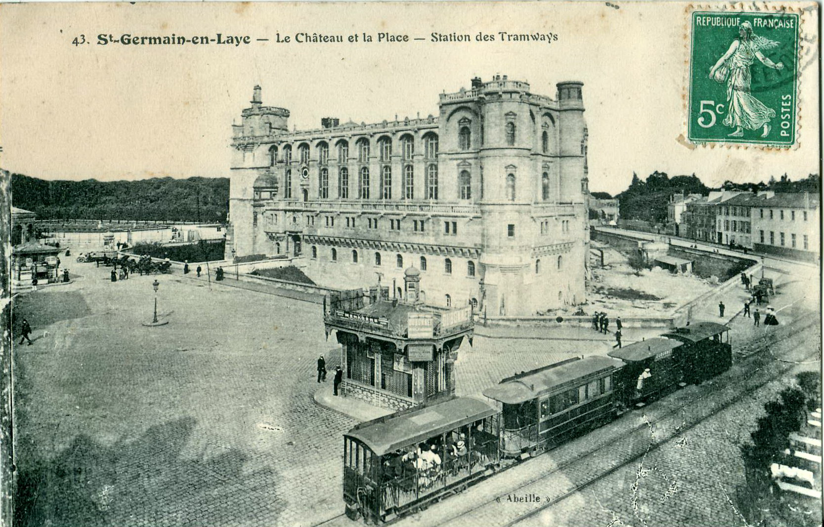 Carte postale ancienne éditée par Abeille N°43Saint-Germain-en-Laye : La Château et la Place - Station des Tramways